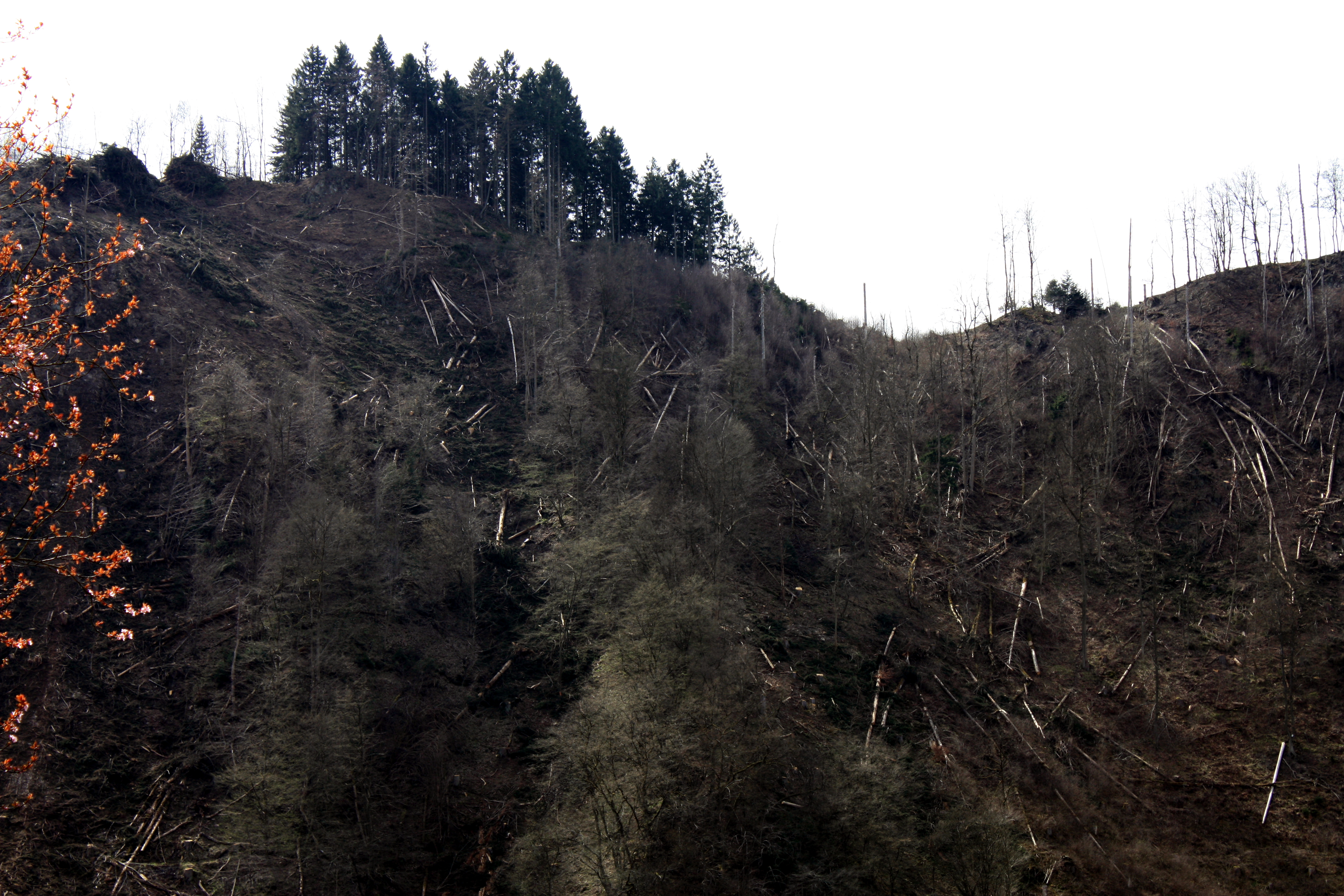 Waldfläche mit Totholz (Fichten) als Folge des Orkan Kyrill vom 17. Januar 2007. Osthang an der Lenne des Naturschutzgebiet MK-008 Eschmecke-Hückenstein in Werdohl. Des Weiteren ist die Fläche ein Teil des FFH-Gebietes „Schluchtwälder im Lennetal“ (DE-4712-301). IMG 6465